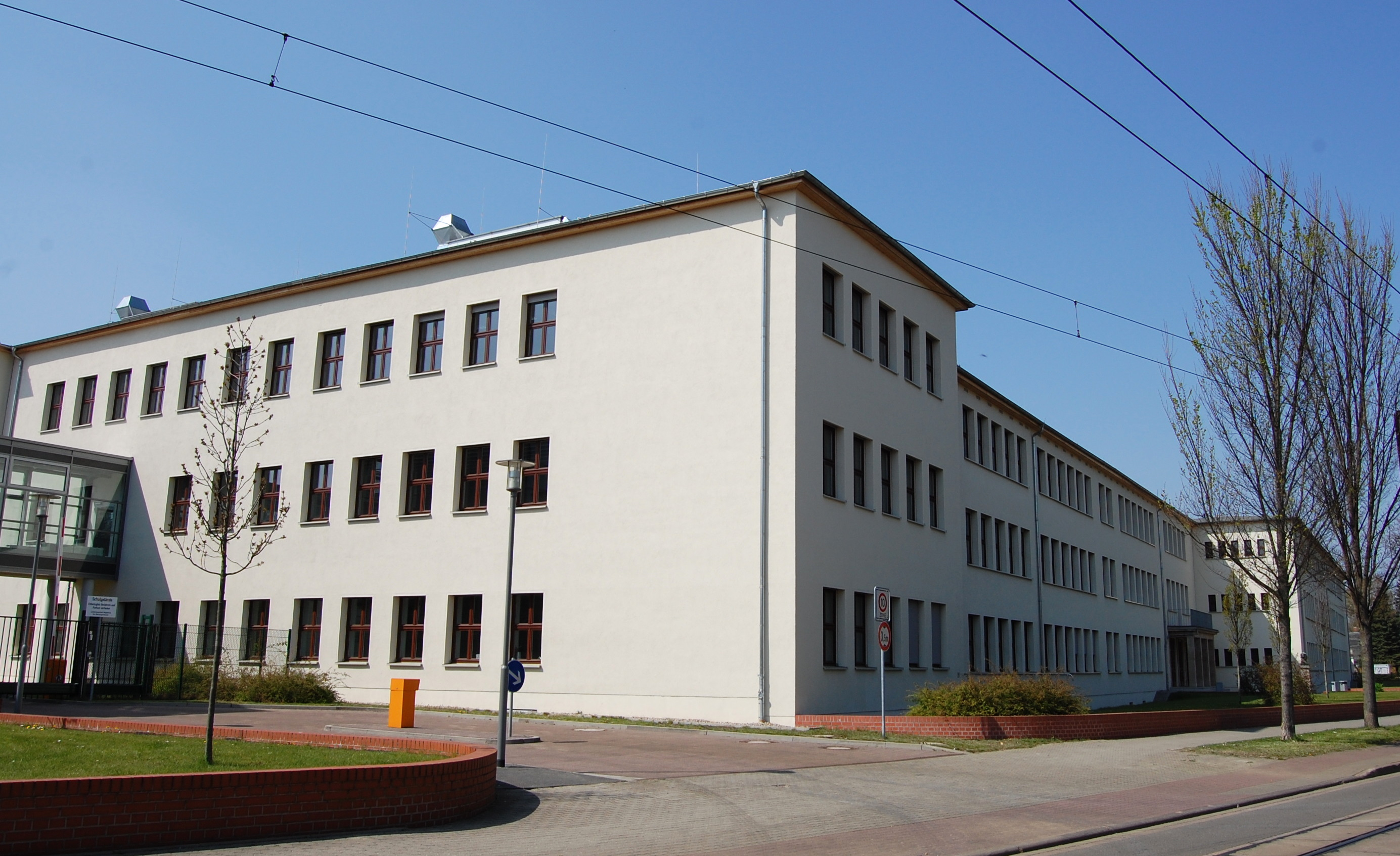 Berufsschule Dr. Otto Schlein in Magdeburg Westerhüsen, Blick von Süden